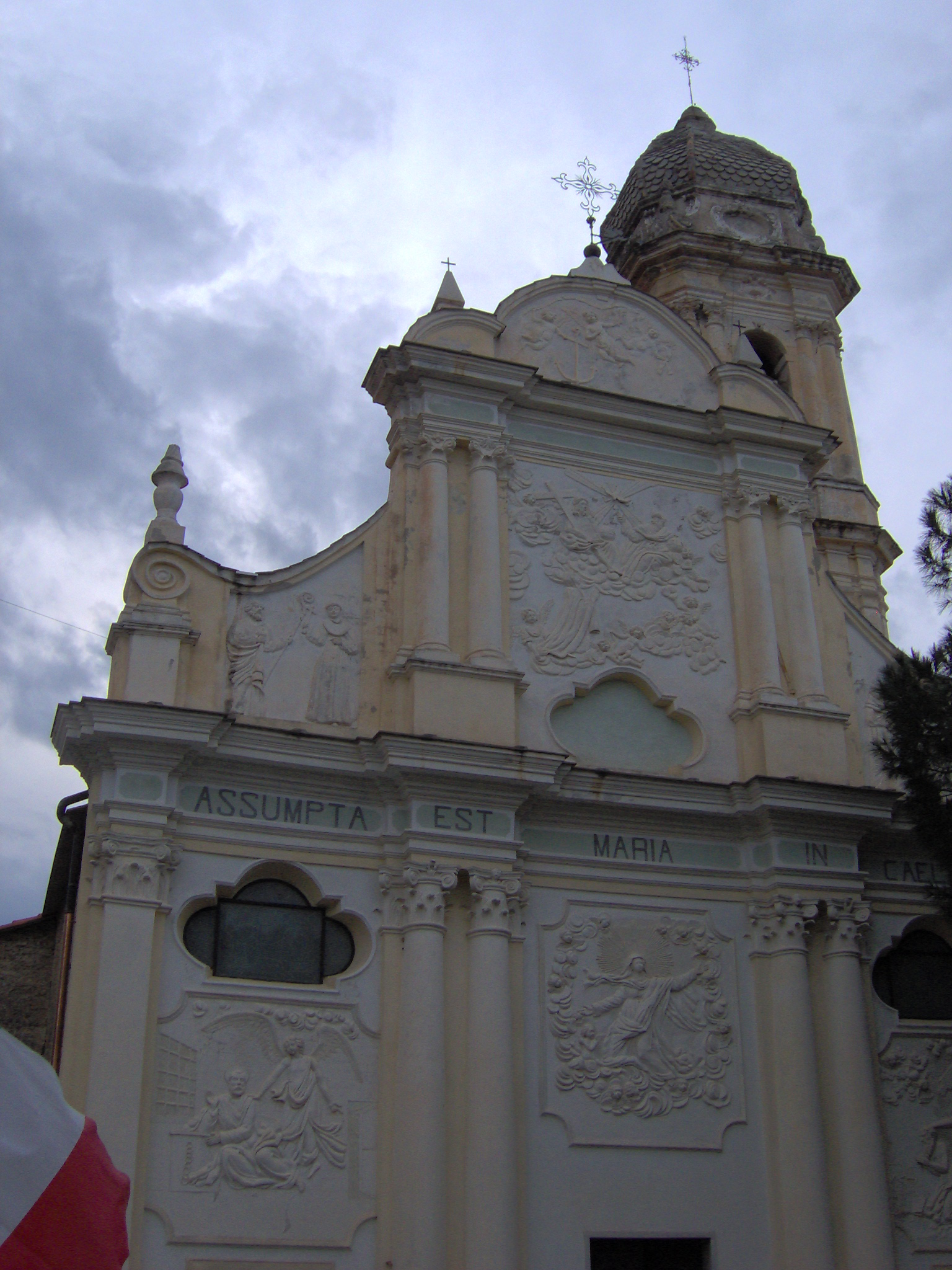 Facciata della chiesa parrocchiale di Pompeiana